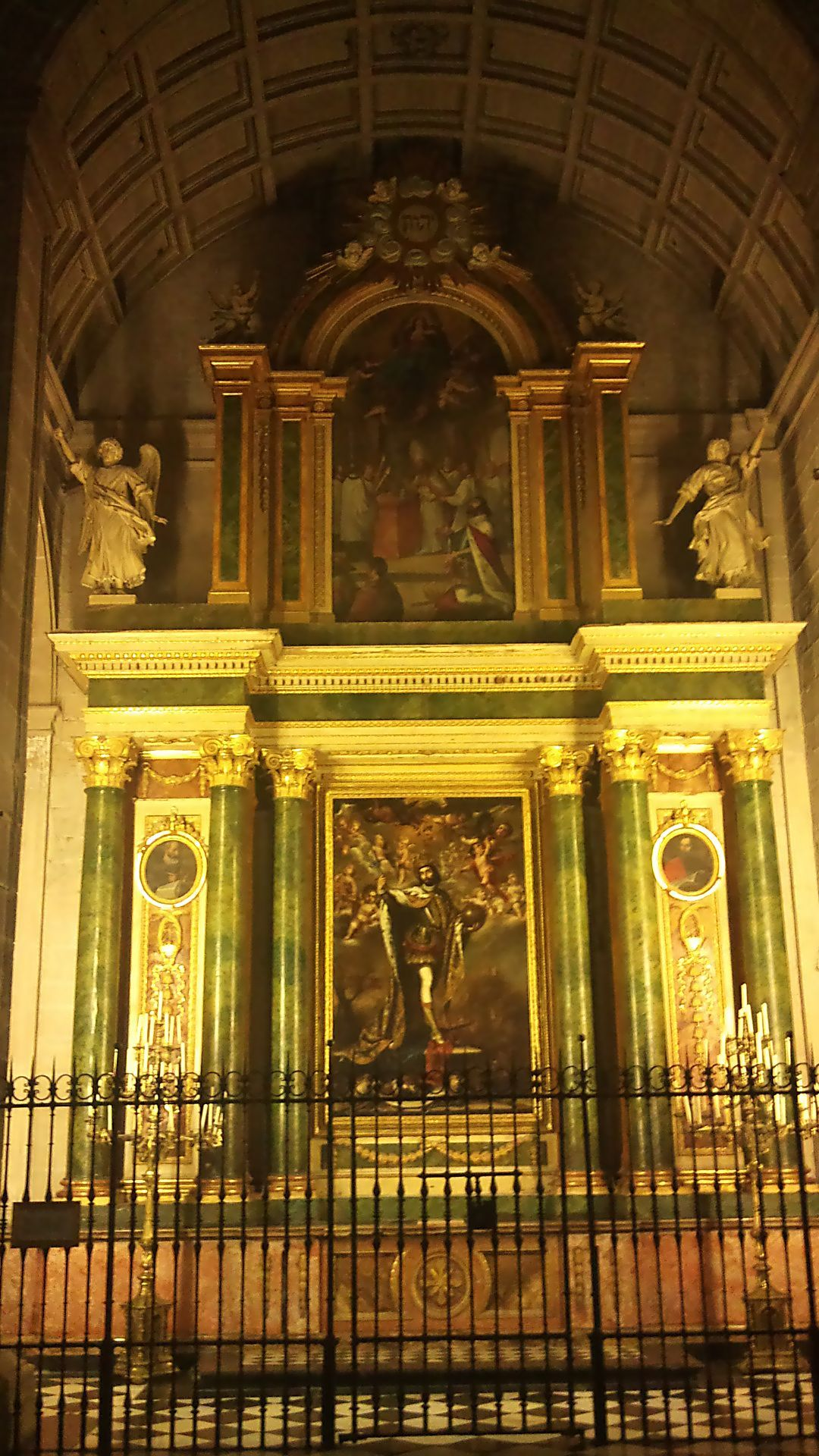 Capilla de San Fernando de la Catedral de Jaén. Se observa el cuadro del santo vestido de rey atribuido a Juan de Valdés Leal.